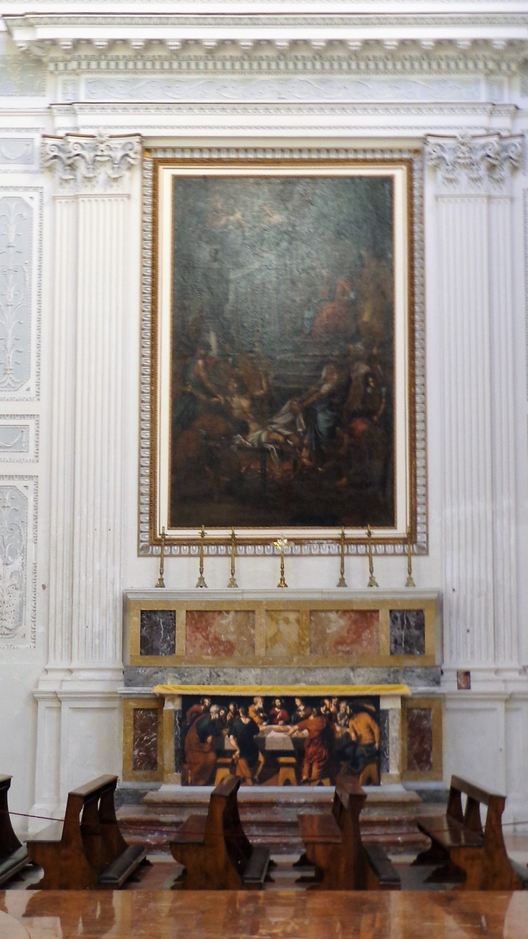 Cappella di San Lorenzo, altare con dipinto raffigurante Martirio di San Lorenzo, opera di Giuseppe Felice del XVIII secolo, Protobasilica cattedrale di San Lorenzo, Trapani.